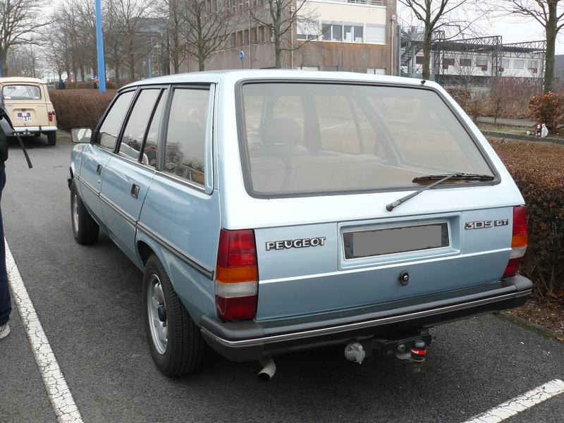 Français cadien: Reims 2012